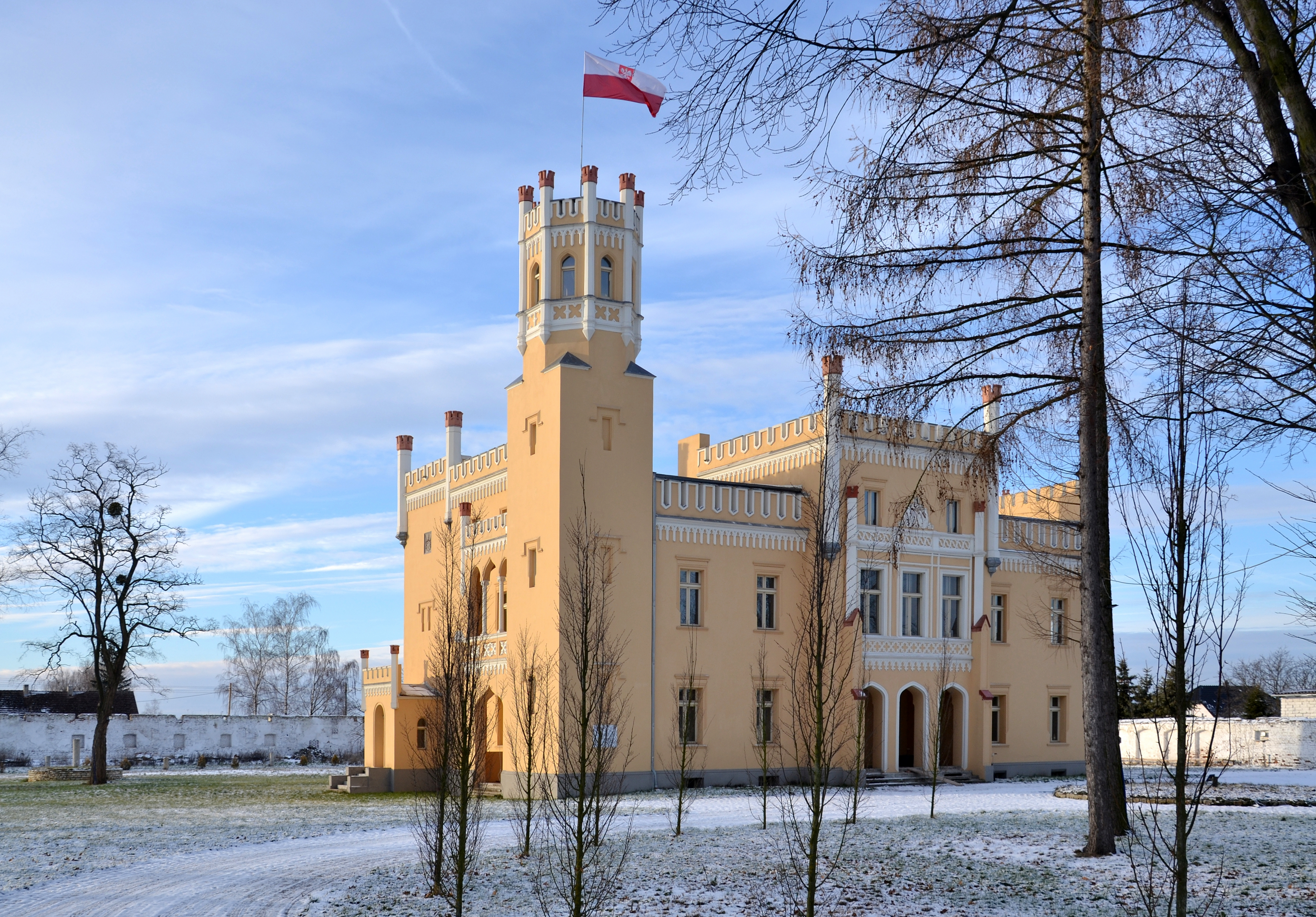 Wyremontowany pałac w Naroku, Górny Śląsk